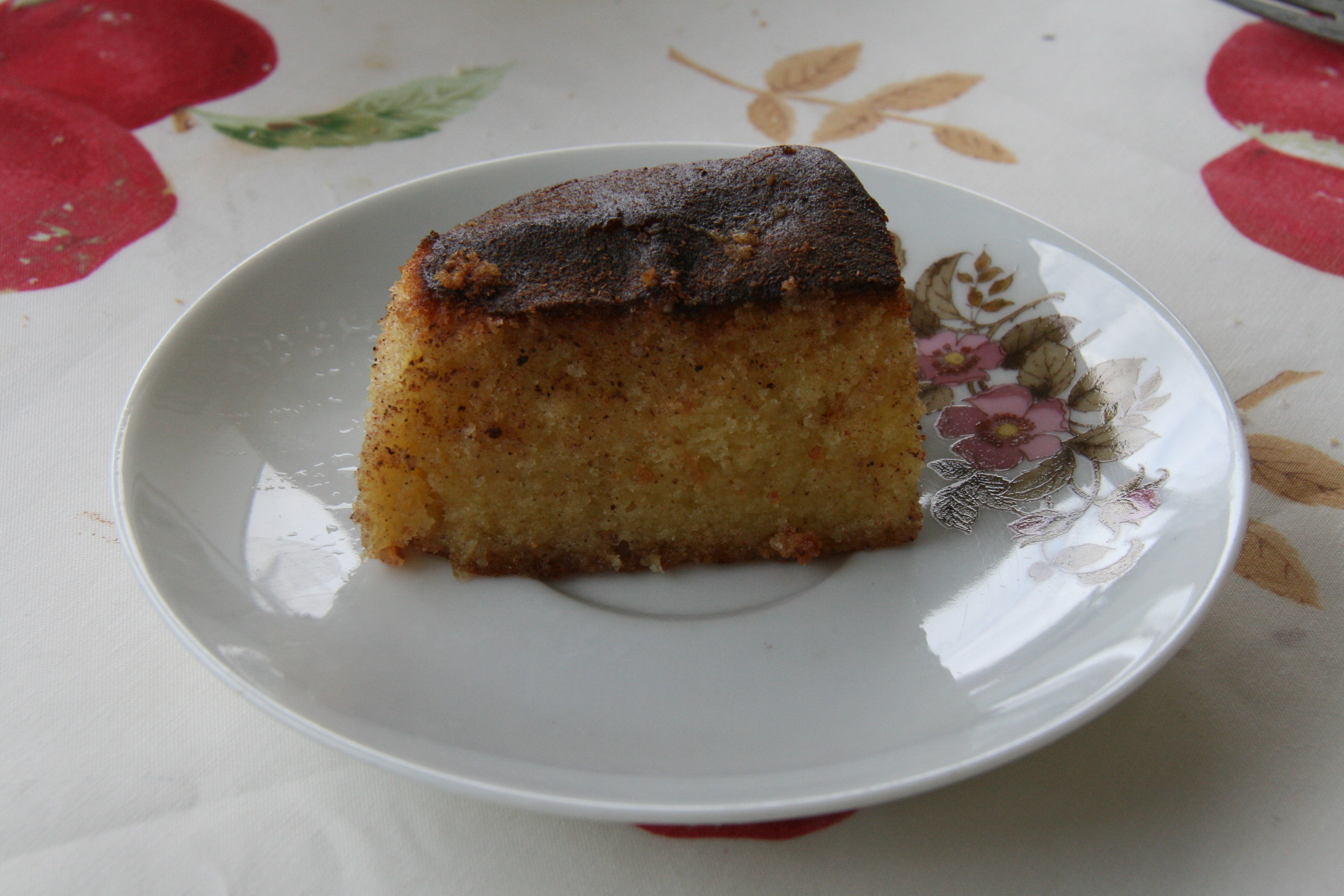 Borrachos - Postre típico de Alcañices